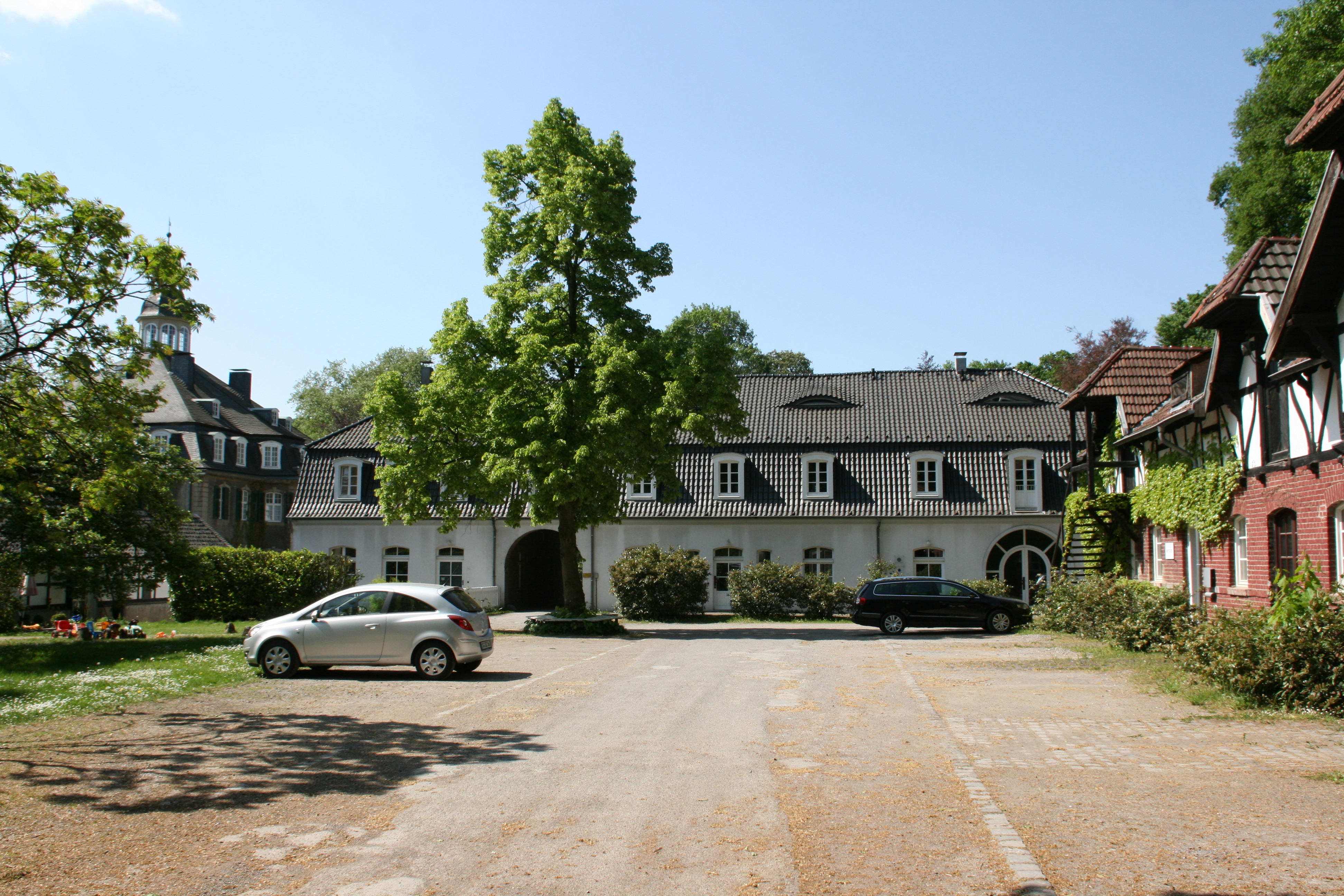 Nebengebäude von Schloss Hackhausen in Solingen